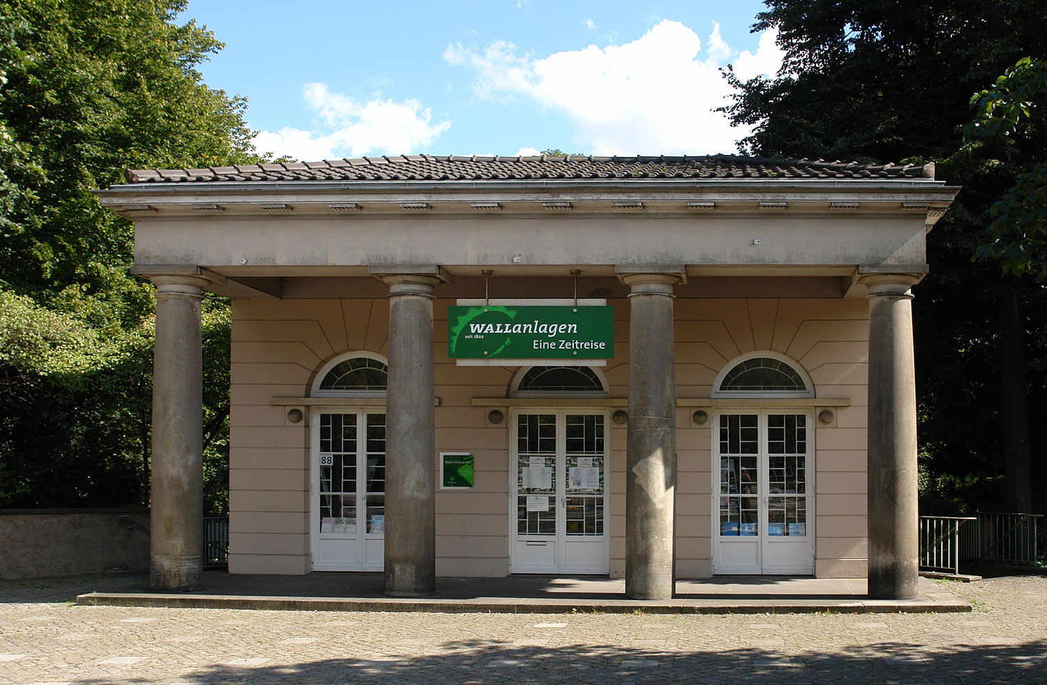 Ansgarii-Torhaus. Bürgermeister-Smidt-Straße 88. Herstellung: 1960 Landesamt für Denkmalpflege Bremen